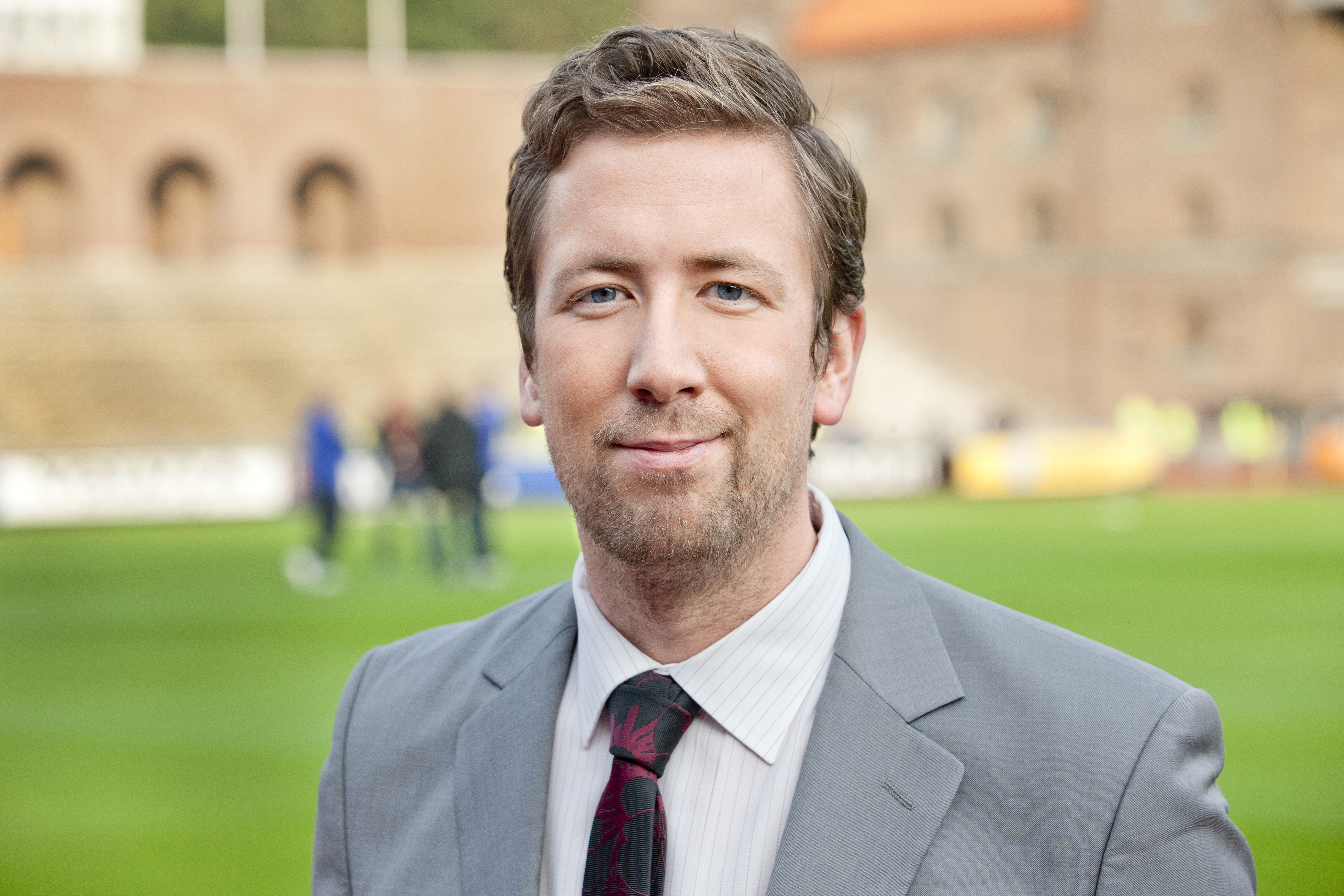 Fotbollskommentatorn och sportjournalisten Jonas Dahlquist.